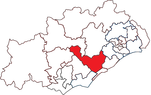 Situation du canton dans le département de l'Hérault